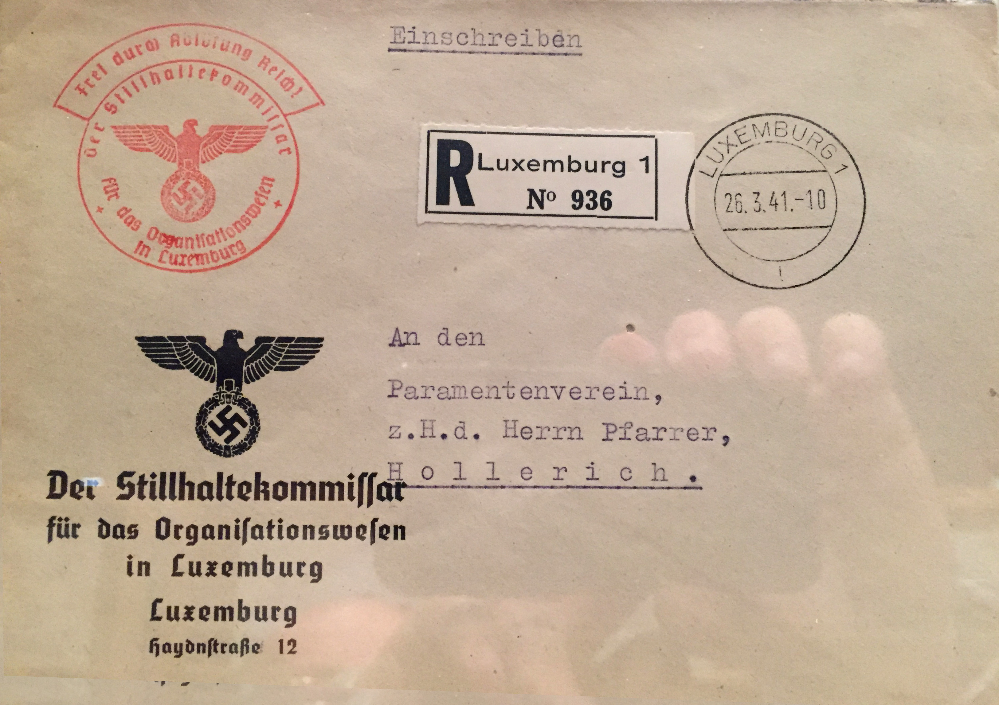 26. Mäerz 1941: De Stillhaltekommissar (Franz Schmidt, Oberbereichsleiter) schéckt dem Hollerecher Paschtouer e Recommandé. D'Adress Haydnstrasse 12 ass haut 12, Rue Heinrich-Heine.